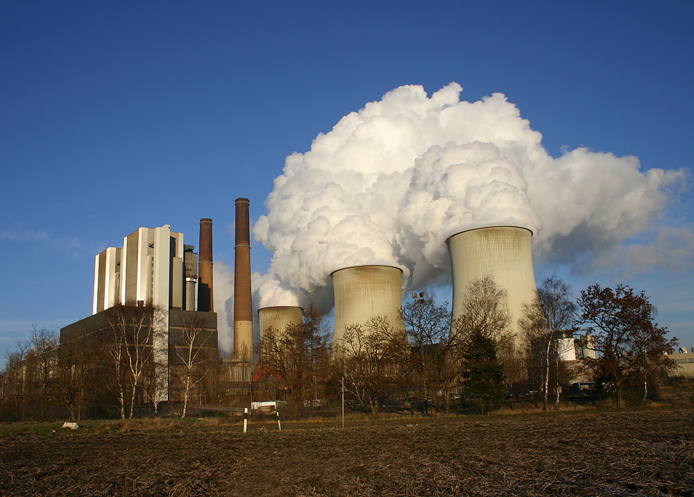 Power Station Weisweiler, Germany.